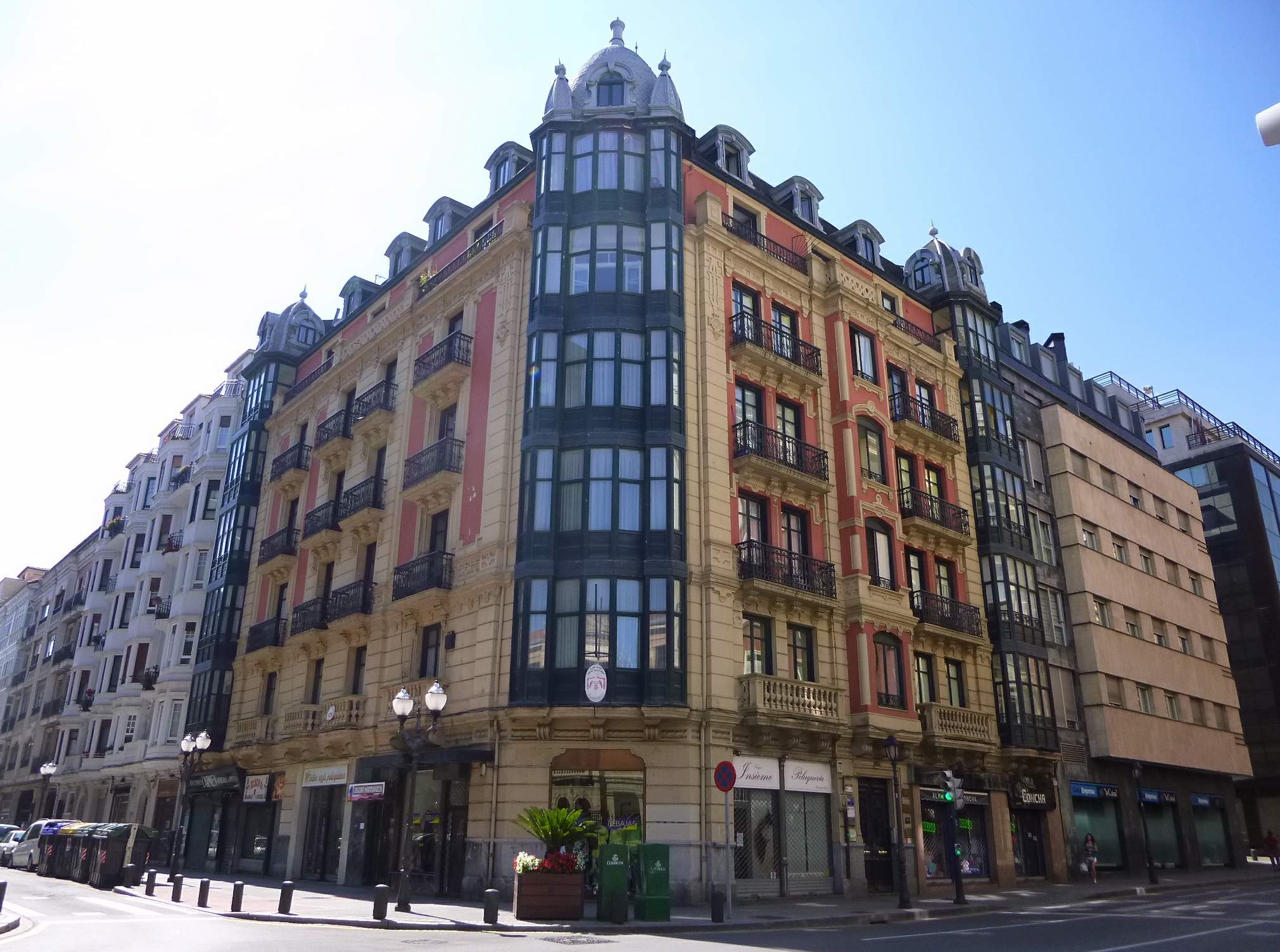 Esquina calles Fernández de Campo y General Concha (Bilbao)